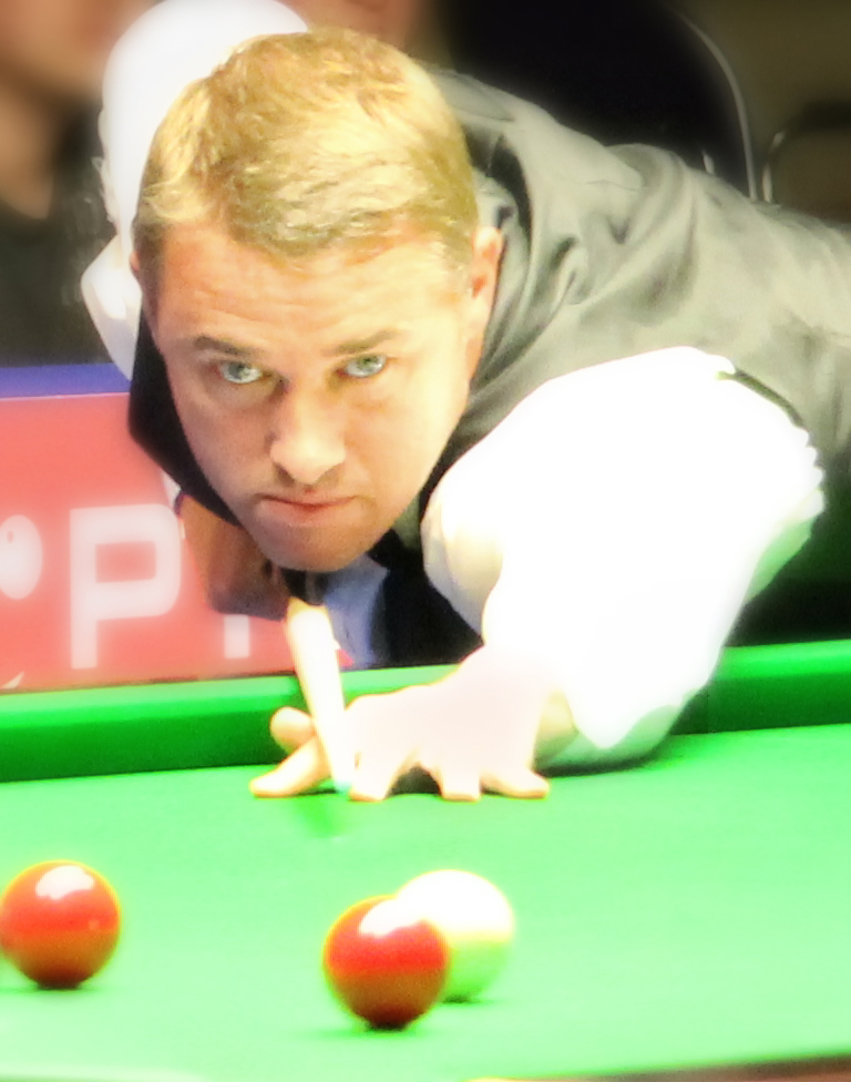 Stephen Hendry beim Paul Hunter Classic 2011